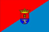 Bandera de Arrecife (Lanzarote)